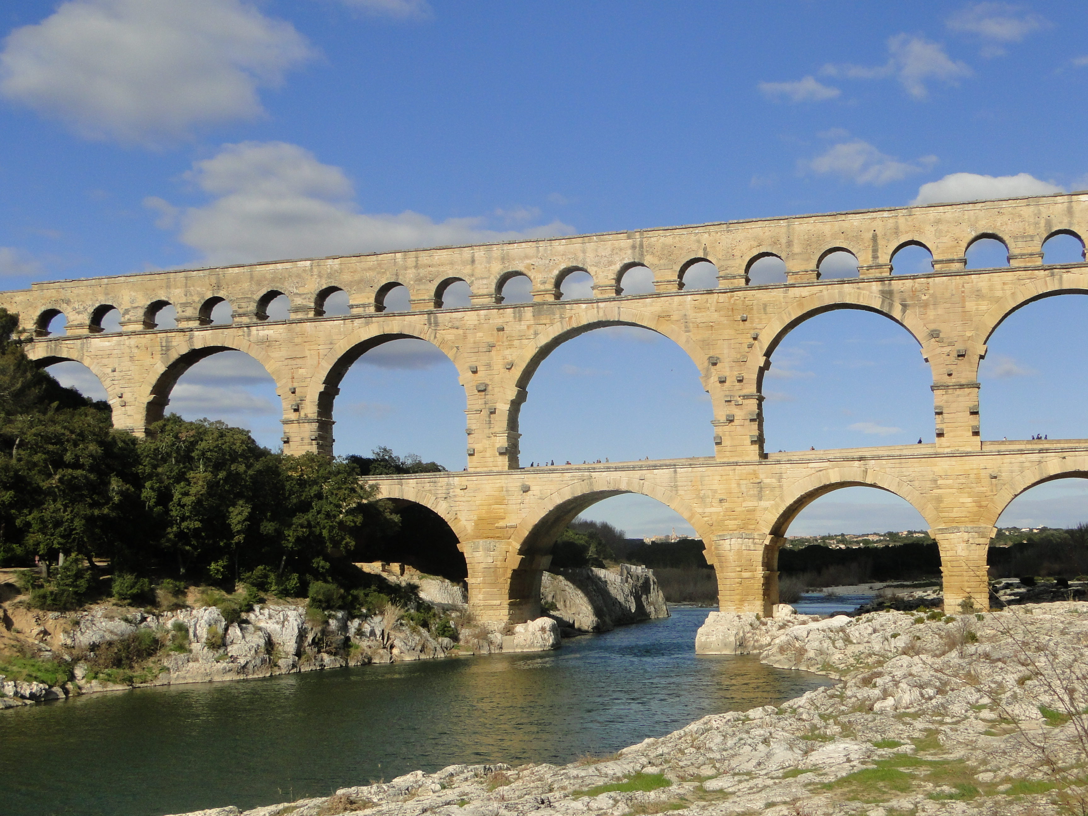 Pont du Gard